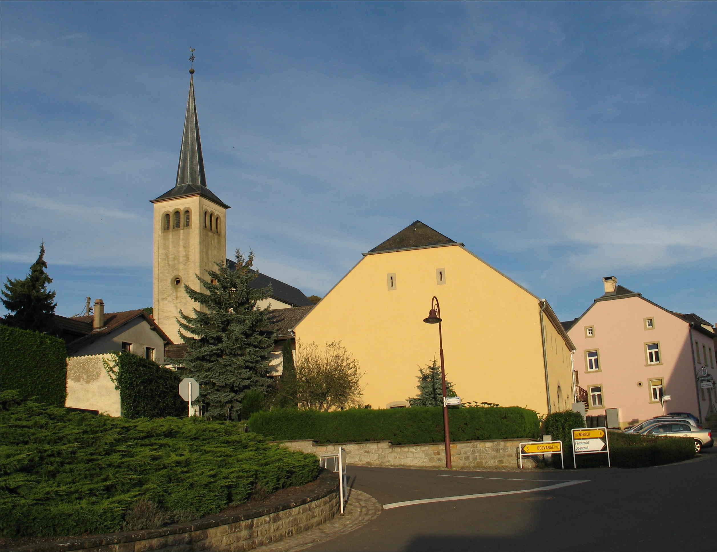 Le village luxembourgeois de Buschdorf